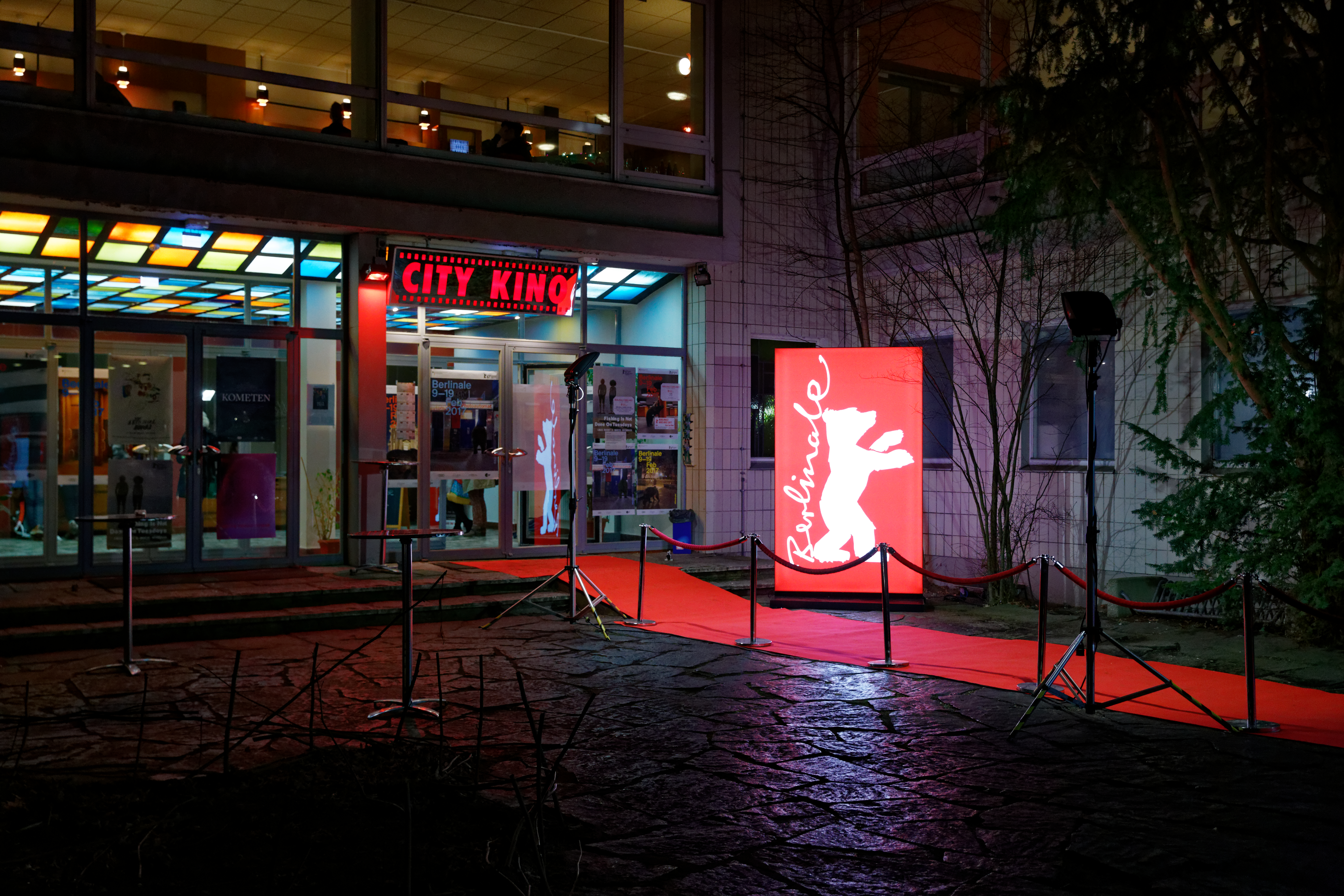 Roter Teppich vor dem City Kino Wedding während der Berlinale 2017